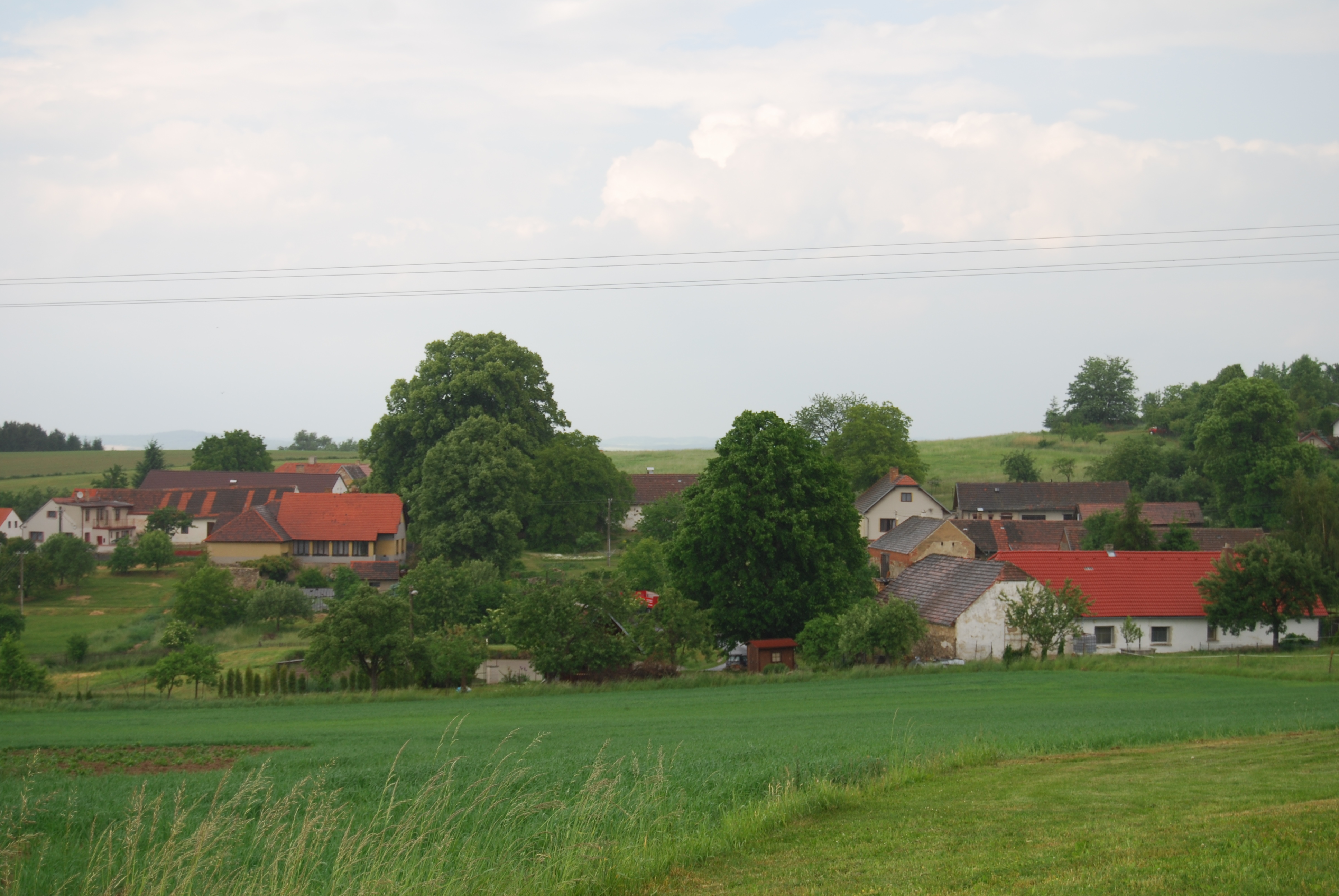 Pohled na okolí obce. Chrastiny (Dolní Novosedly). Okres Písek. Česká republika.